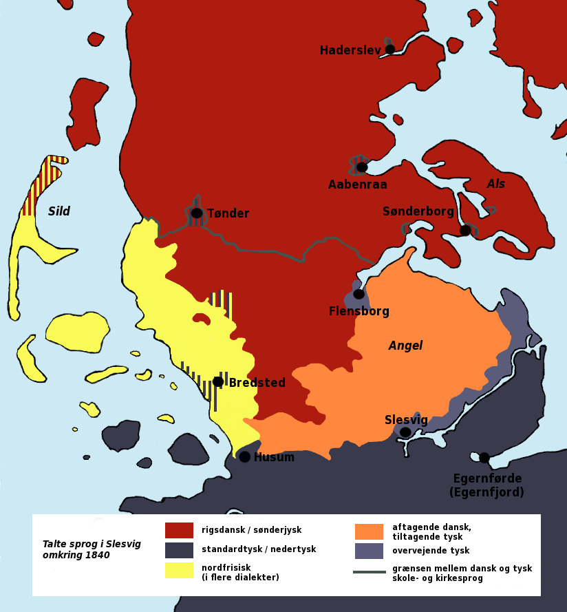 Sprogforhold i Slesvig omkring 1840, kilde: "Sprachwandel in Schleswig um 1840" i Historischer Atlas Schleswig-Holstein vom Mittelalter bis 1867, Neumünster 2004, under hensyn til historiske kort fra 1800-tallet.